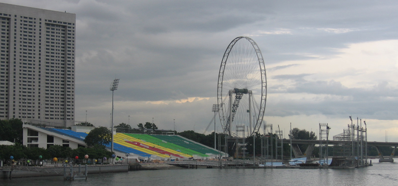 Marina Bay Floating Platform